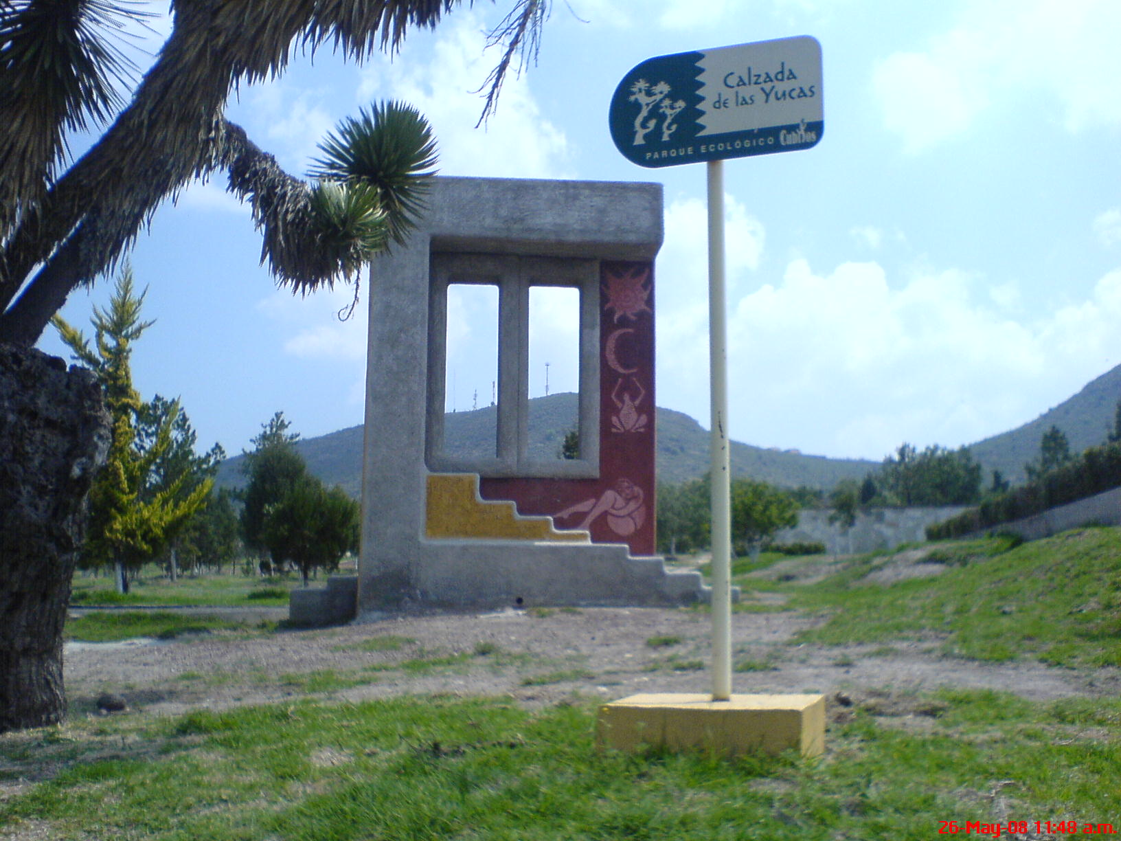 Calzada de las yucas en el parque ecologico de cubitos,en pachuca